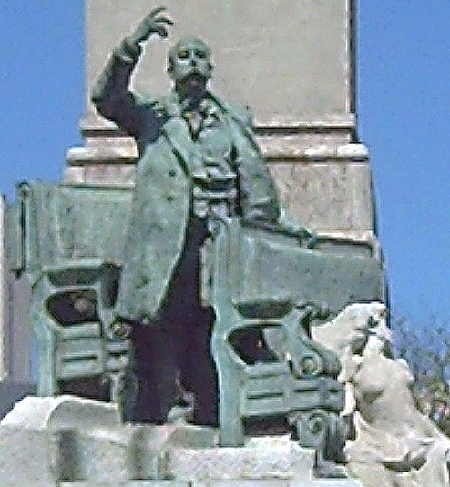 Detalle del Monumento a Emilio Castelar, Paseo de la Castellana, Madrid. Escultor Mariano Benlliure.